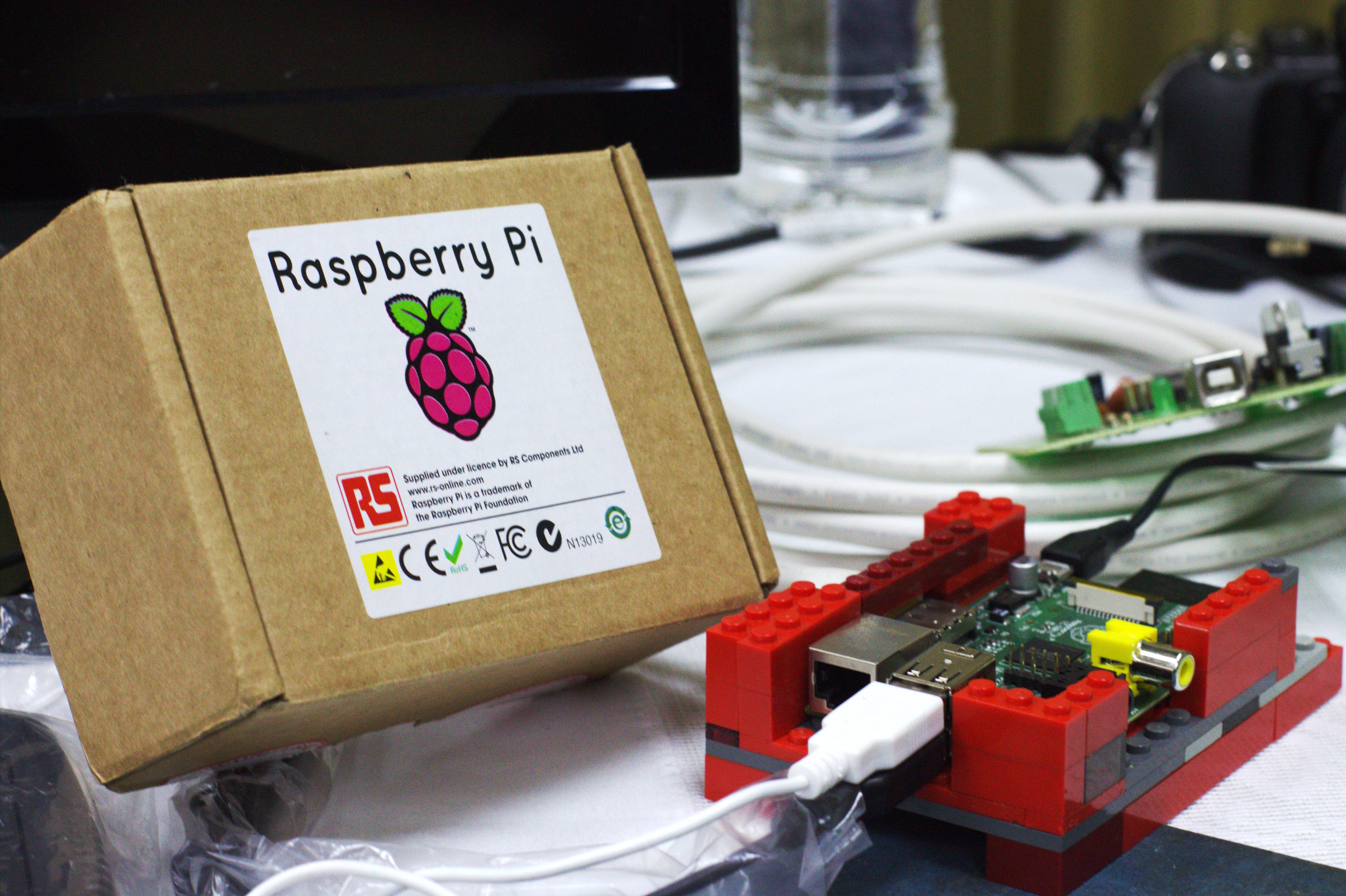 Raspberry Pi y cajeta.